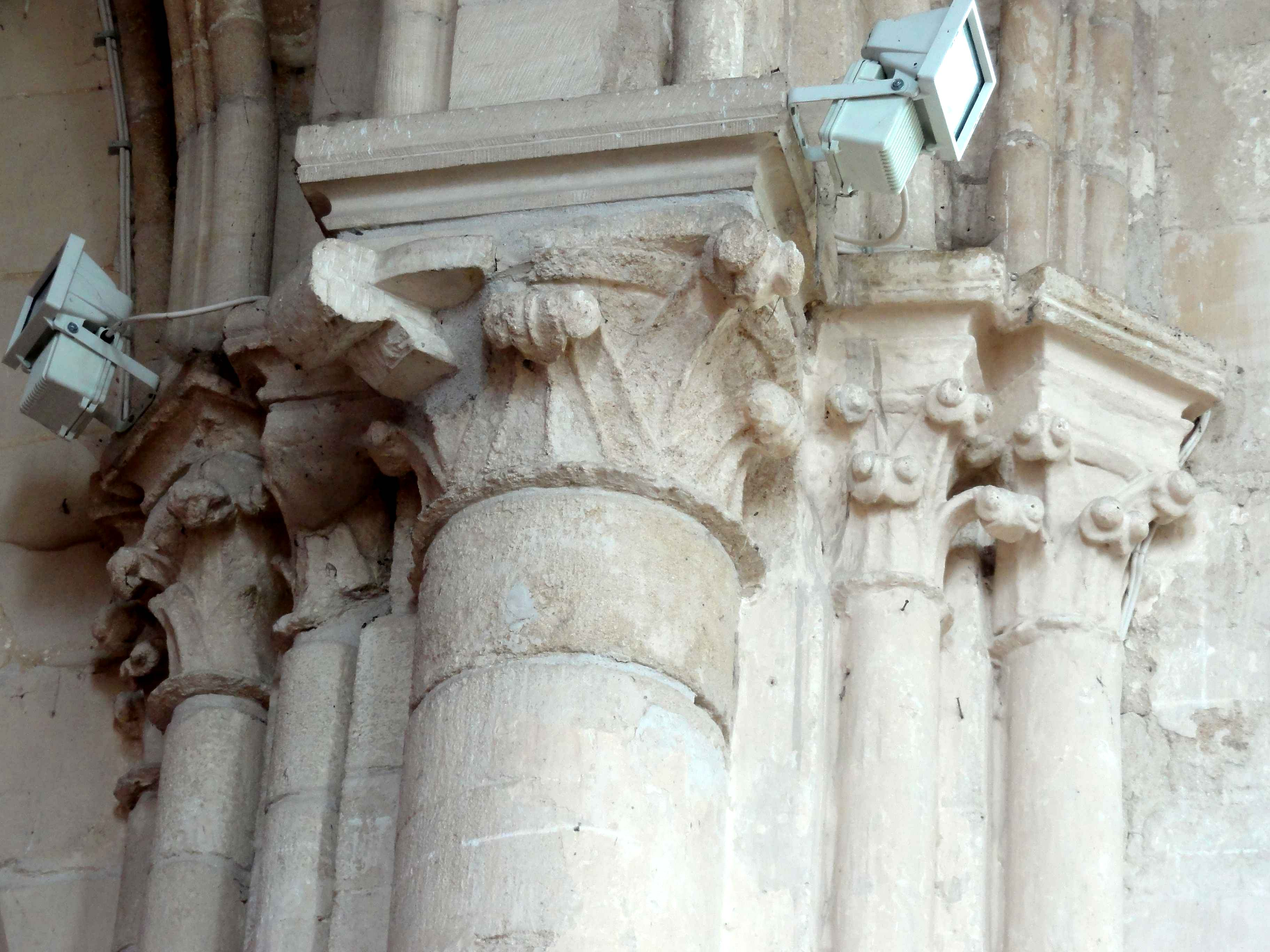 Chapiteau(x) de l'église - voir titre.